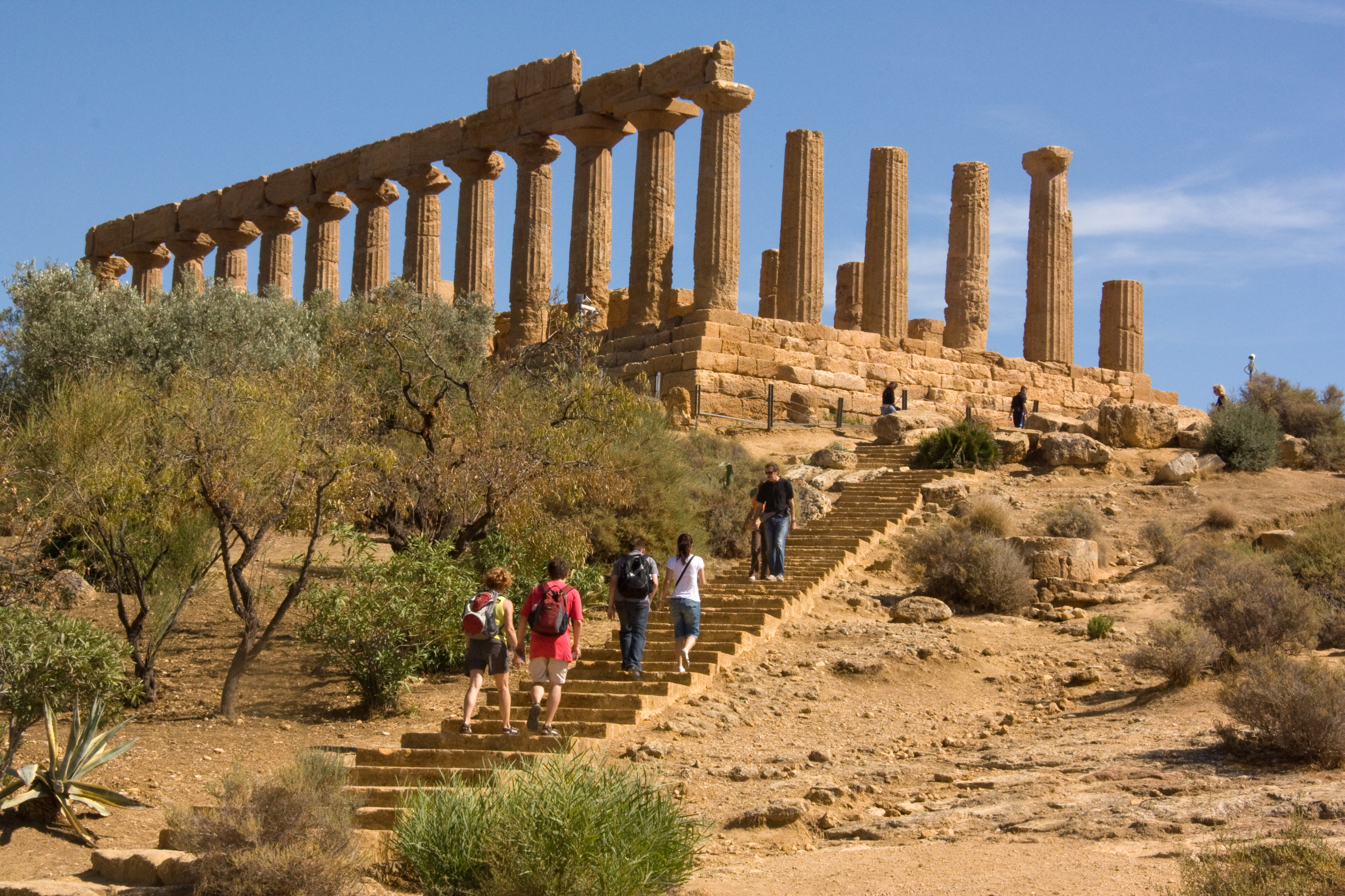 Tempio di Giunone (Temple de Junon), Agrigento , Sicile, Italie